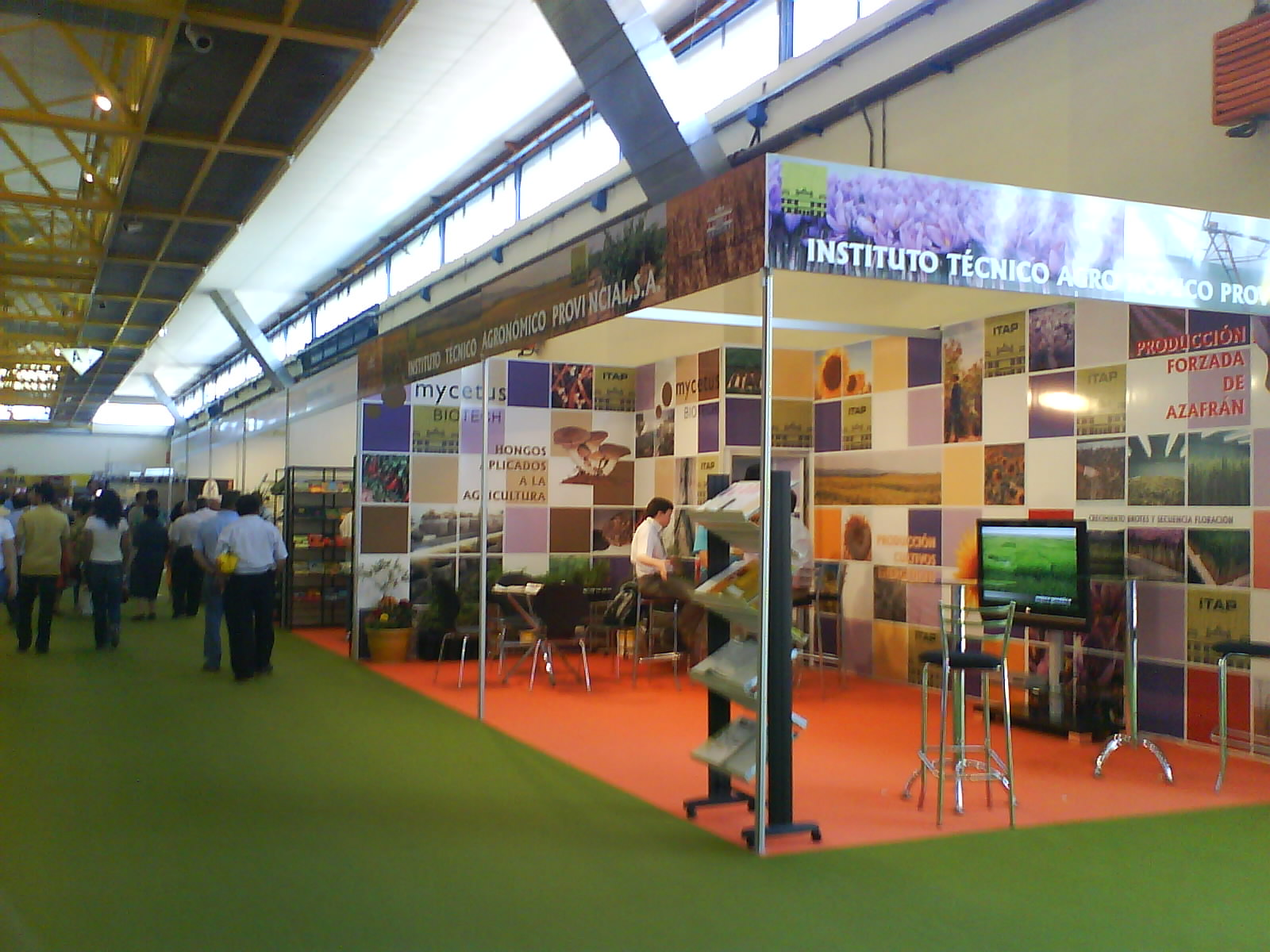 Exposición interior en la feria agrícola y ganadera de Castilla-La Mancha "Expovicaman", celebrada en el Palacio del IFAB de Albacete.